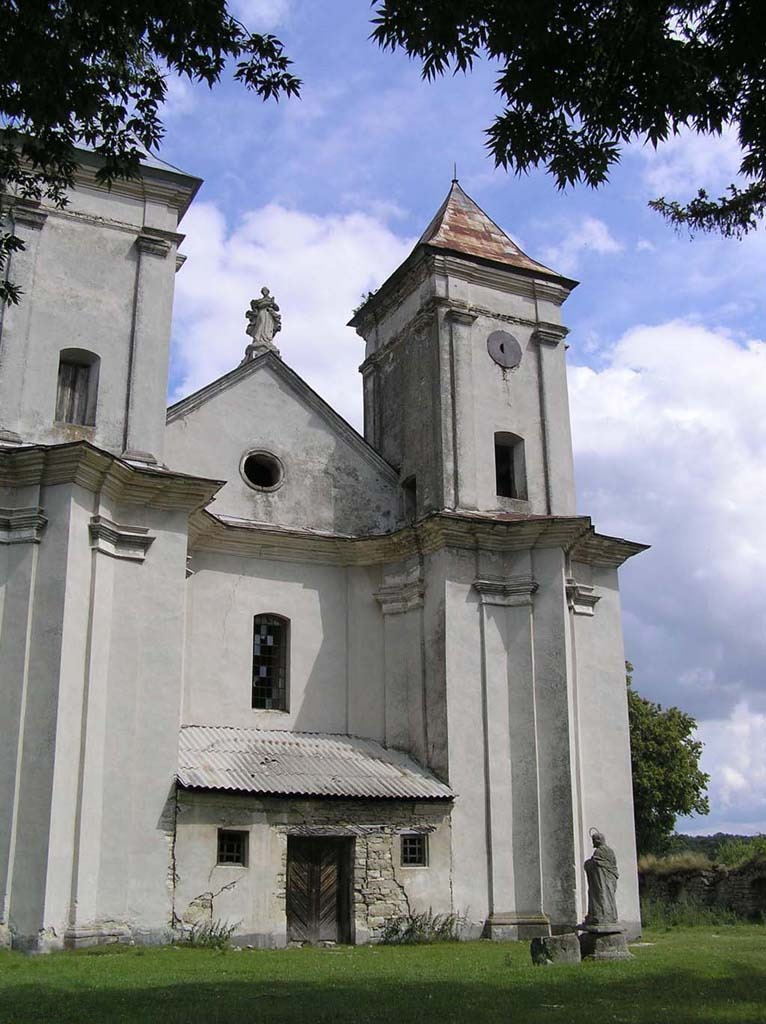 Костел, Сидорів